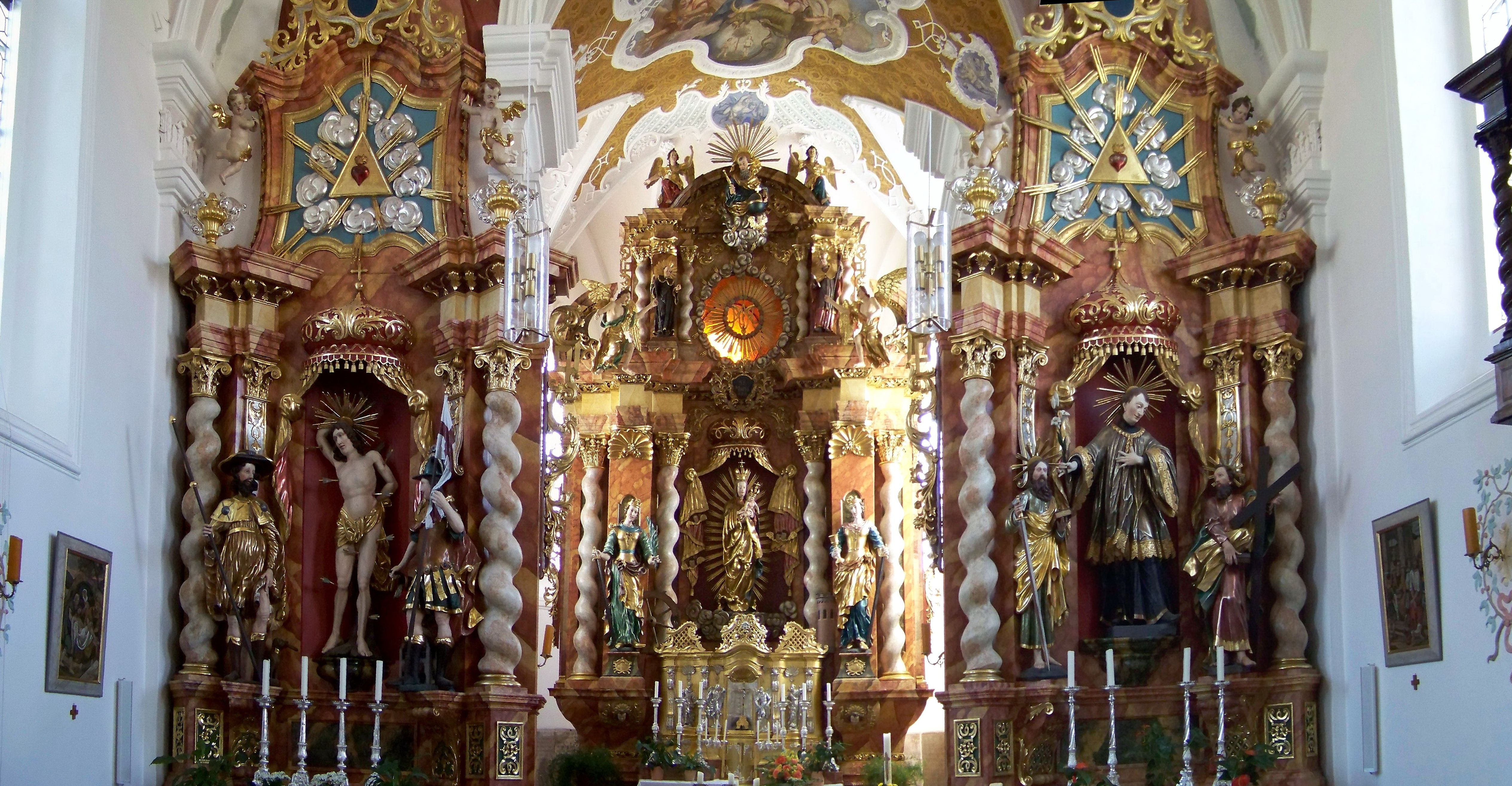 Furth bei Landshut (Niederbayern) Landshuter Straße 14. Katholische Kirche St. Sebastian. Saalkirche mit eingezogenem Chor. Spätgotische Anlage des 15. Jahrhunderts, barockisiert 1741; mit Ausstattung. Gewölbter Innenraum mit drei Altären.